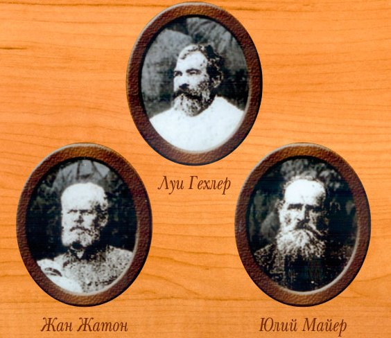 Основатели нынешнего предприятия ПАО "ДМК Таврия"